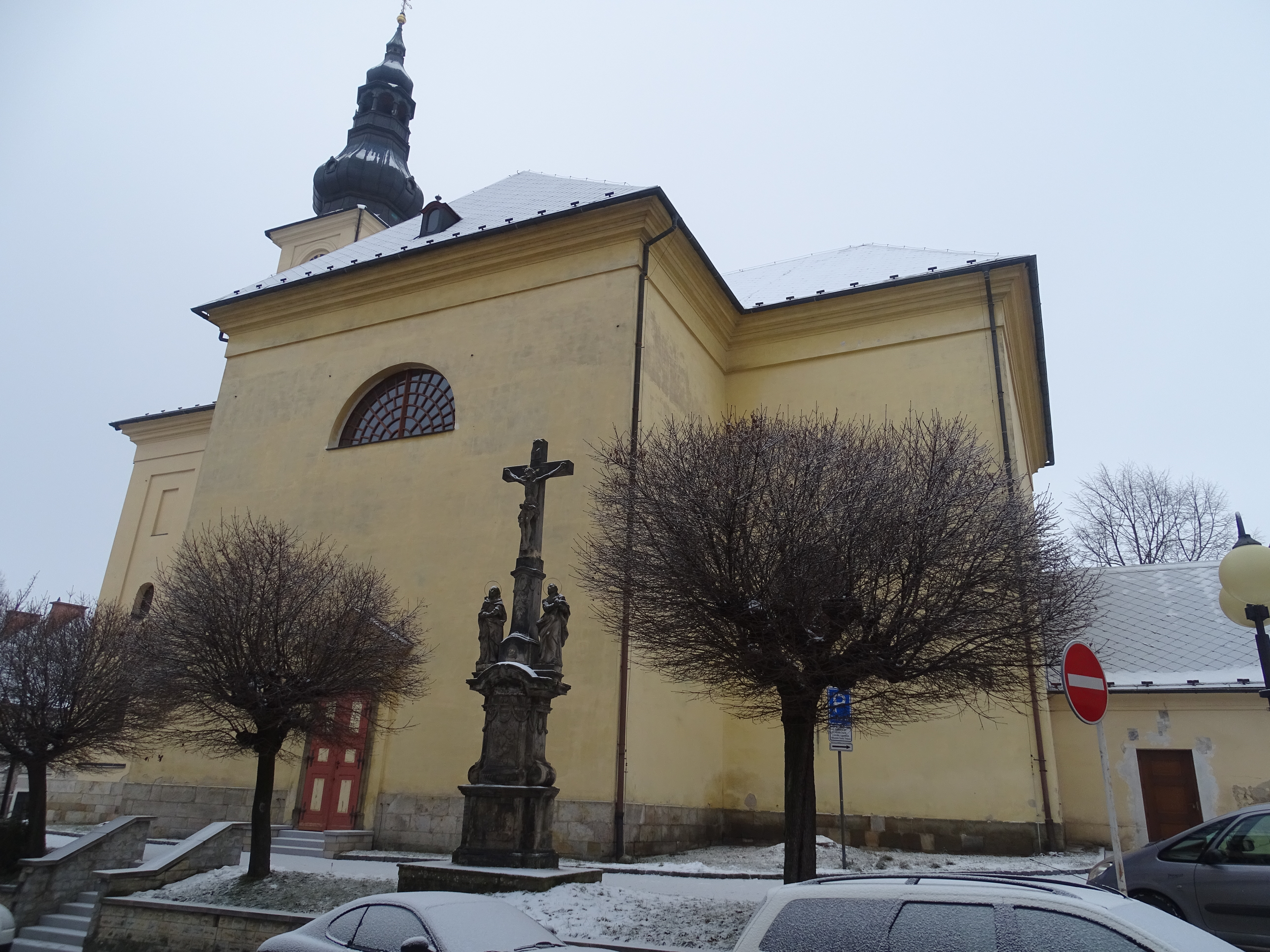 kostel